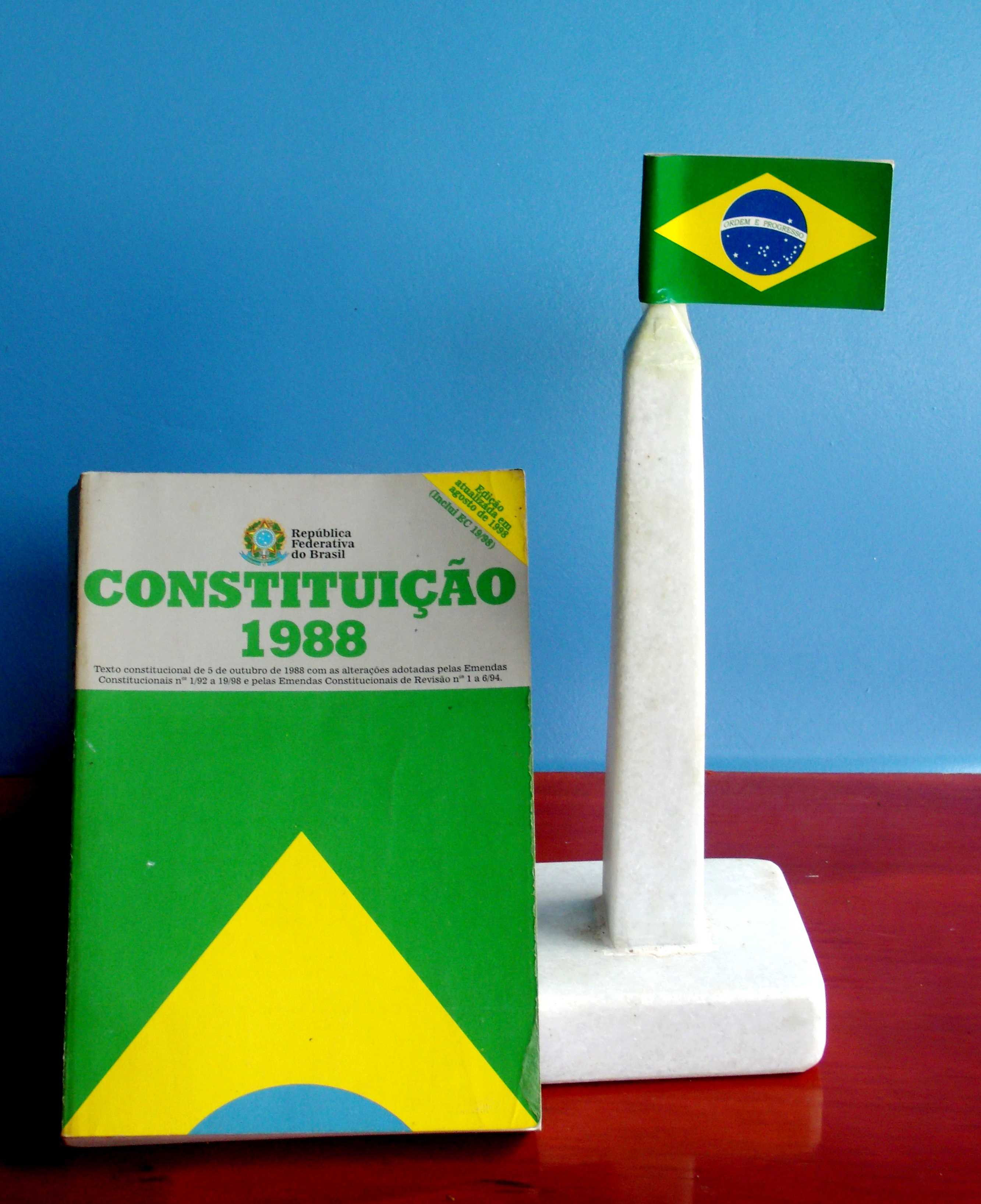 Constituição do Brasil de 1988 com um mini obelisco servido de mastro da bandeira nacional do Brasil, sendo expostas em uma Casa cultural.